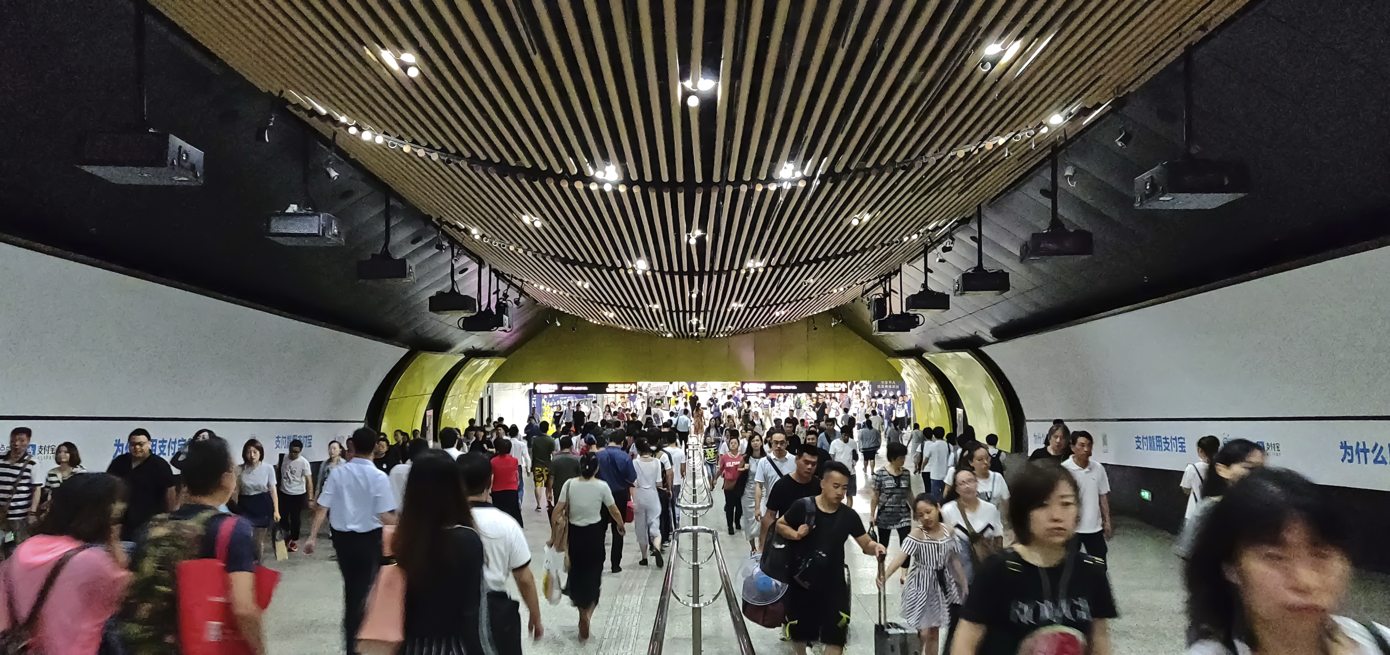 地铁徐家汇站换乘通道南段。